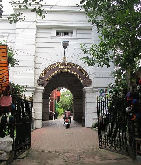 Entrance of the Government College of Art & Craft. File:Govt College of Art and Craft, Kolkata.jpg cropped.